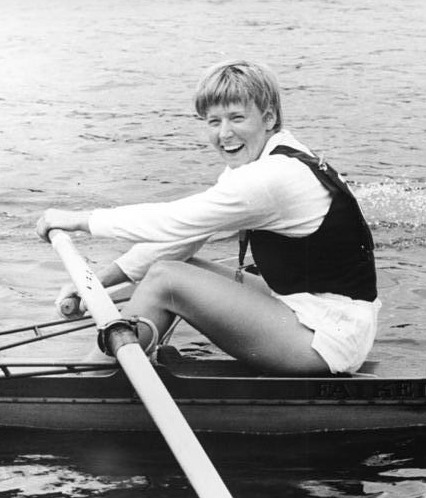 Anita Kuhlke ADN-ZB Mittelstädt 18.7.71 Berlin-Grünau: Rudermeisterschaften der Deutschen Demokratischen Republik für Männer und Frauen- Im Einer für Frauen konnte Anita Kuhlke von der BSG Motor Wildau ihren Titel erfolgreich verteidigen.